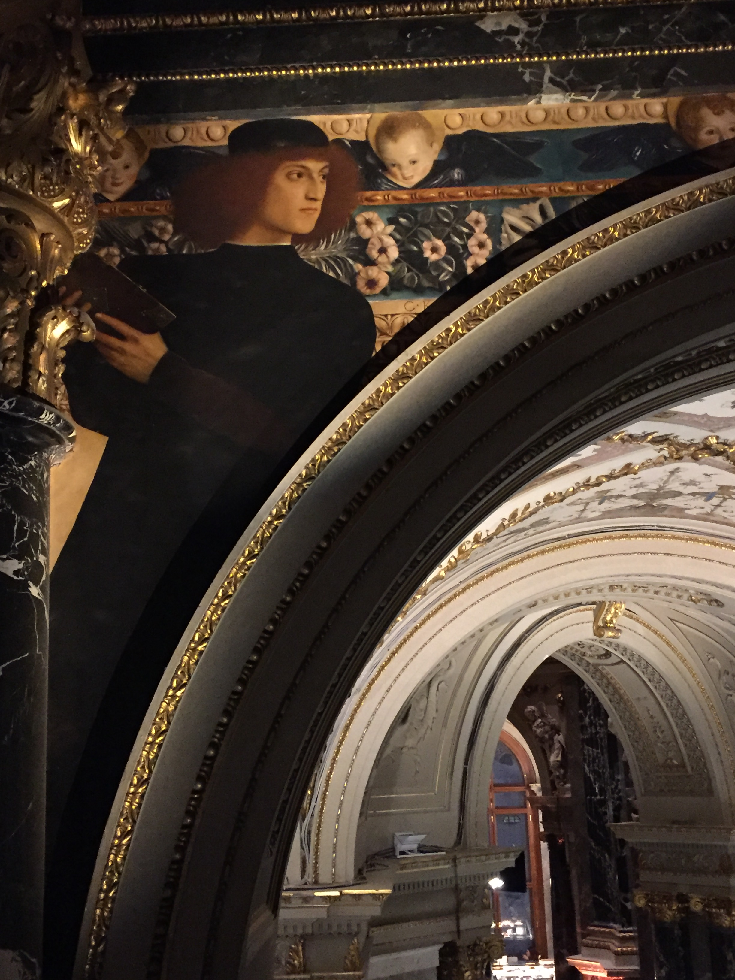 Zwickelbild